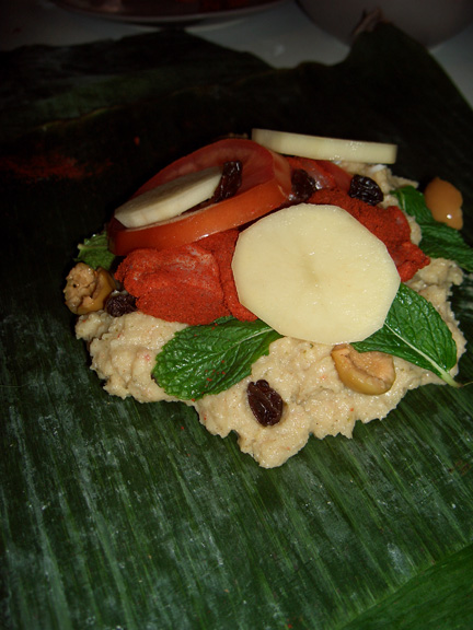 Assembling a Nacatamale